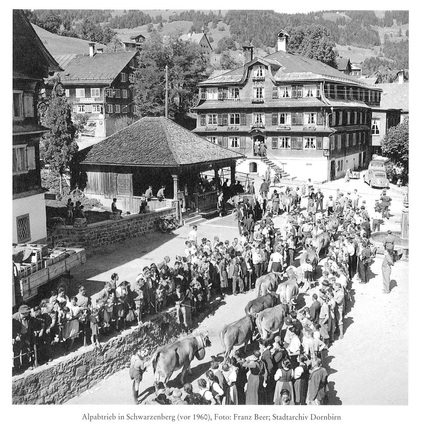 Alpabtrieb in Schwarzenberg im Bregenzerwald, Foto vor 1960. Der Landammann Hans Rüscher beschloss vor ca. 400 Jahren mit seinen Räten auf der Bezegg, "dass man einen Jahrmarkt am Schwarzenberg haben sollte..."